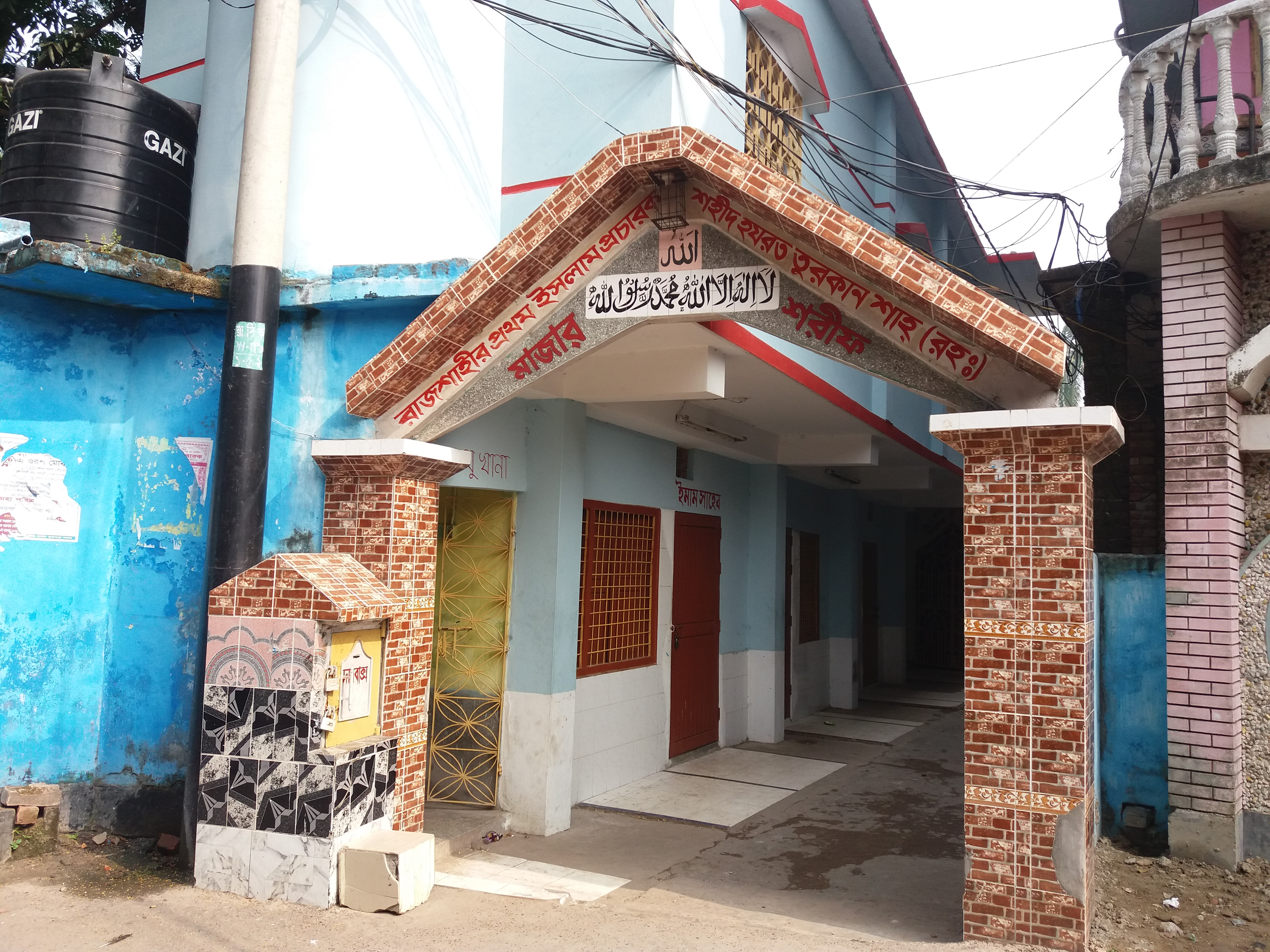 তুরকান শাহের মাজারের প্রধান ফটক